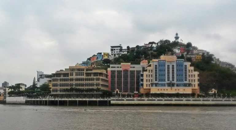 Puerto Santa Ana